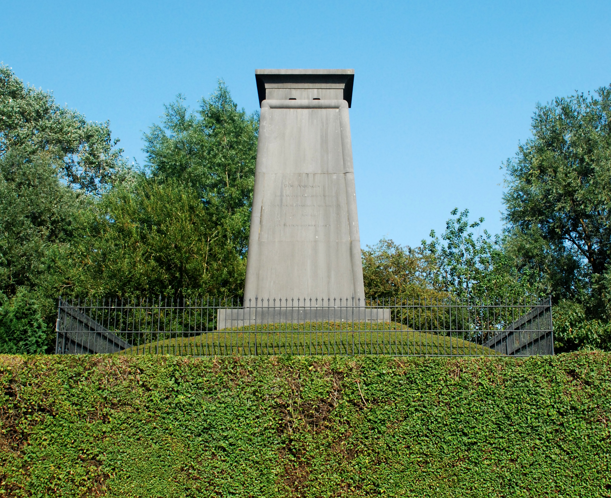 Monument aux Hanovriens 16.JPG